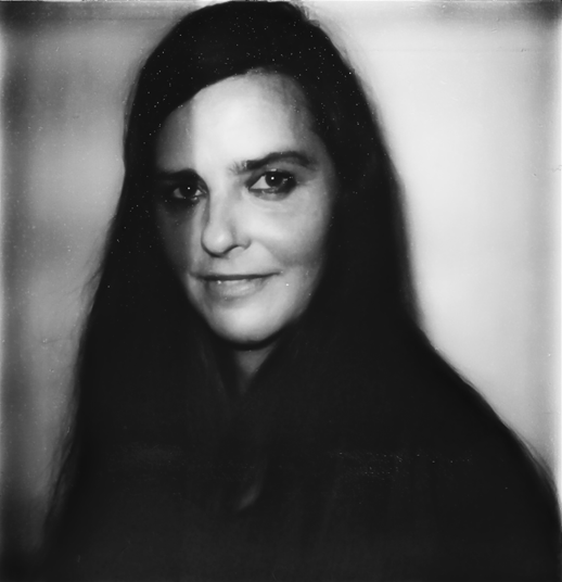 Rineke Dijkstra (Sittard, 2 juni 1959) is een Nederlands fotografe.